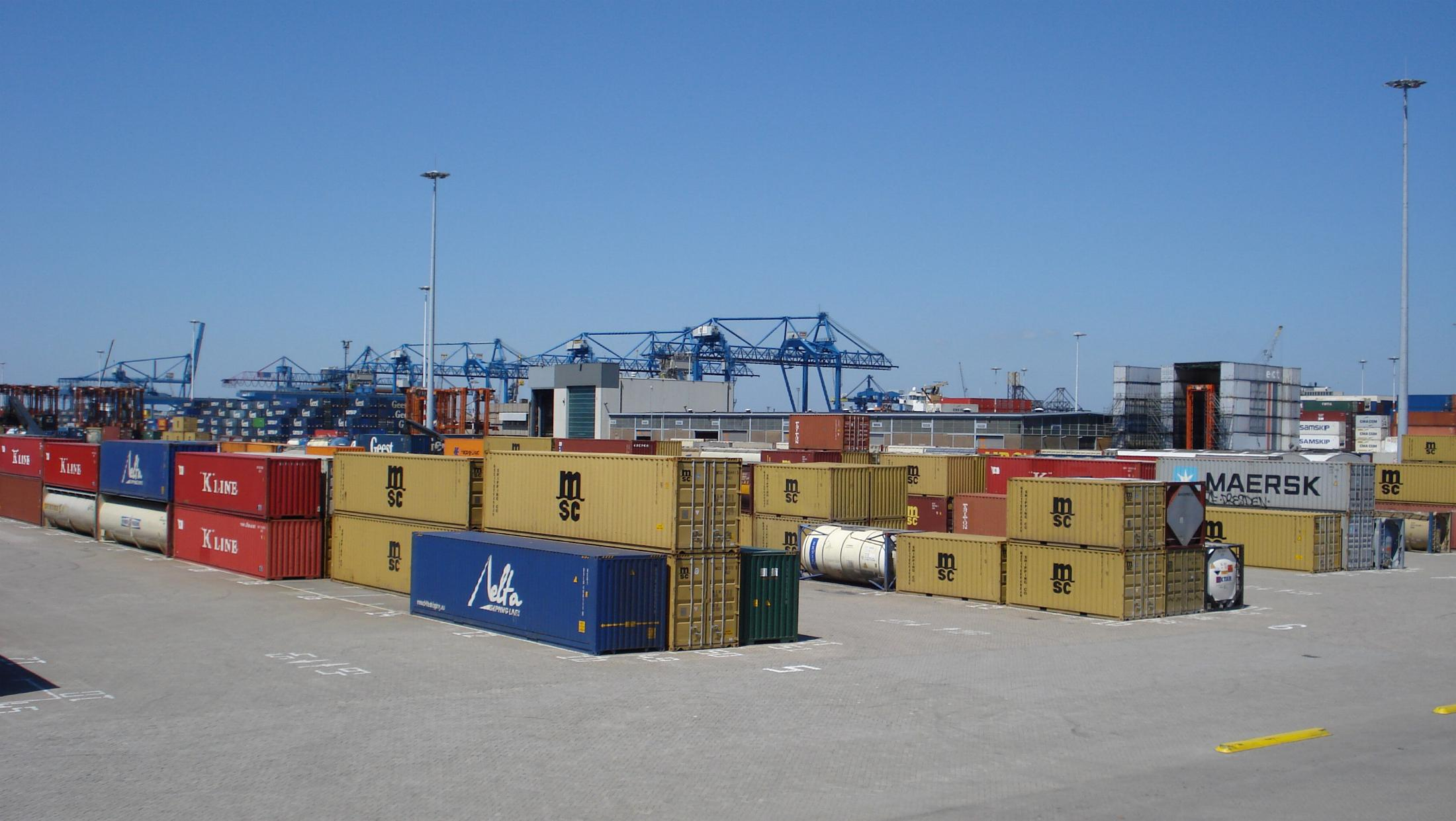 Rotterdam. Containers aan Eemhaven, ten zuiden van Heijplaat